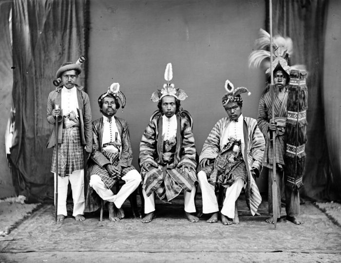 Negatief. Portret van een gezantschap van Buton, Sulawesi